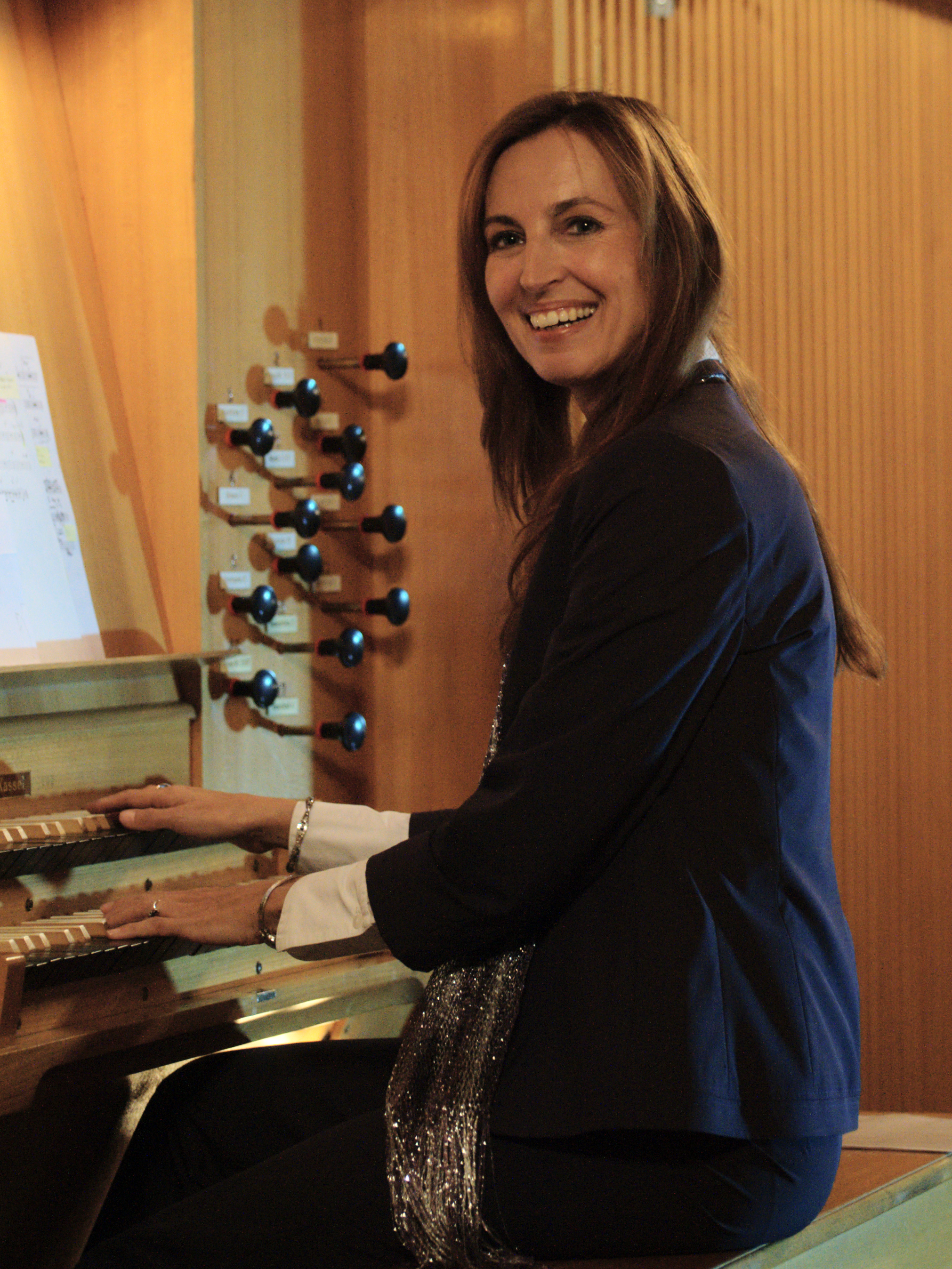 Barbara Dennerlein bei einem Orgelkonzert in der Michaeliskirche Darmstadt am 14.11.2011